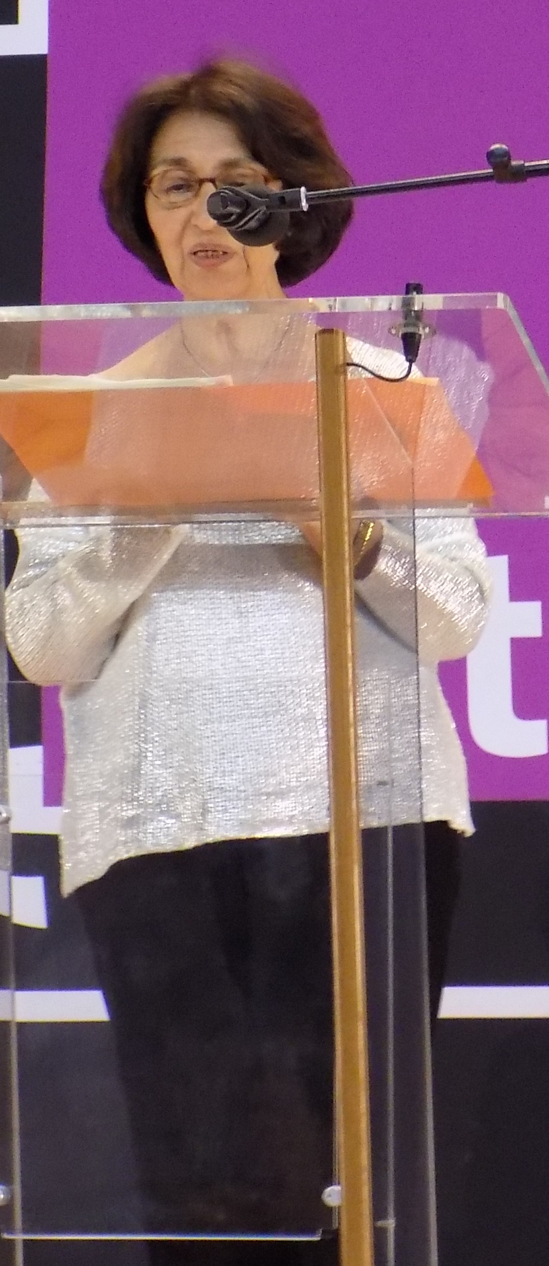 Mireille Hadas-Lebel lors du forum « L’année vue par l’histoire » organisé par France Culture le 25 avril 2015